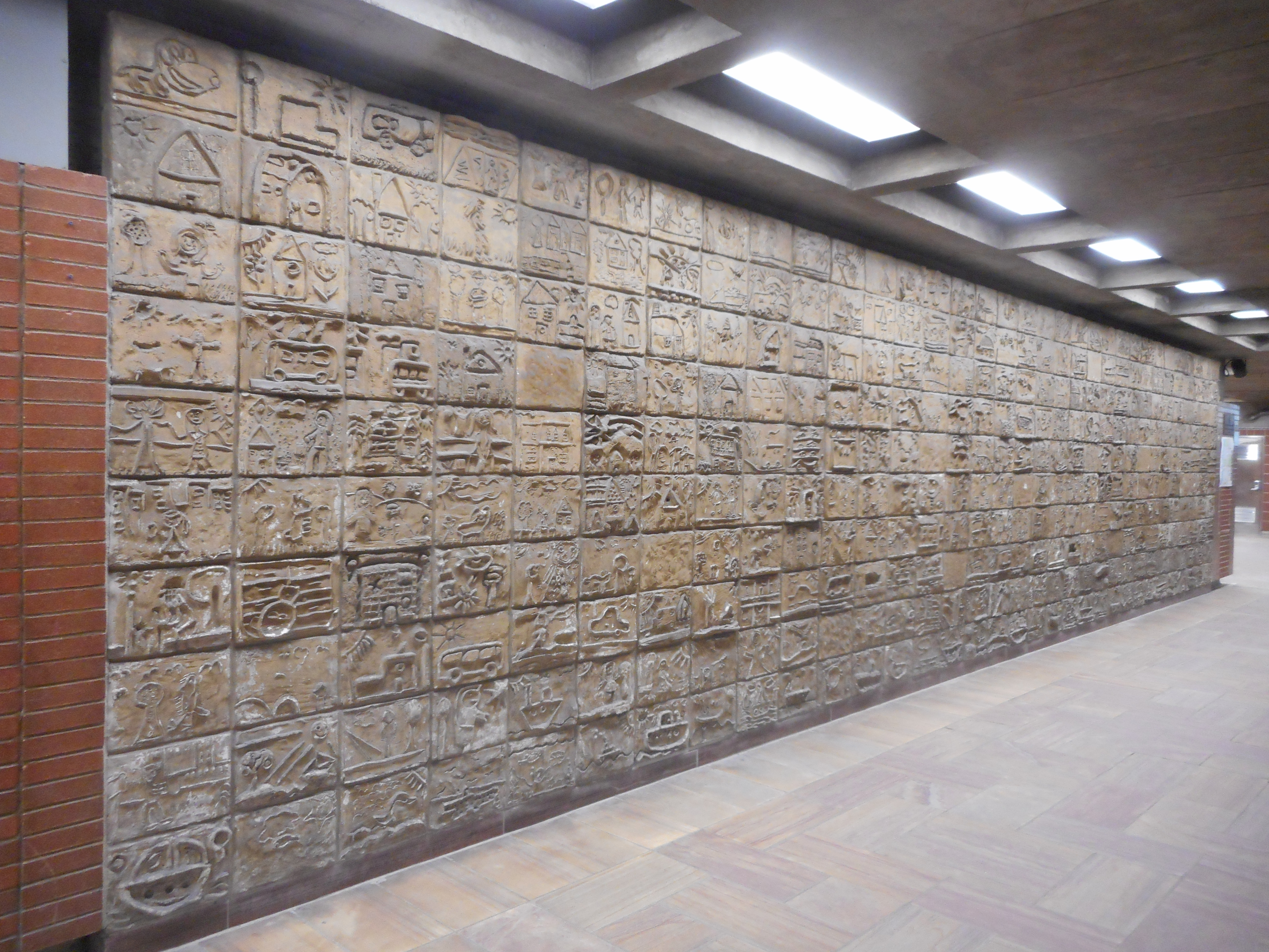 Les enfants dans la ville est une oeuvre collective réalisée en 1979-80 par 330 enfants de Montréal Murale constituée de 330 blocs de ciment coulés à partir de bas-reliefs en terre modelée, créés par des enfants, sur les thèmes de l'habitation, des citoyens, des parcs et des transports.